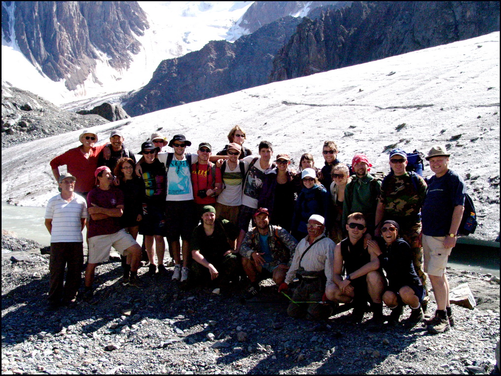 Первая международная школа для молодых учёных и специалистов на Алтае. Ледник Актру.